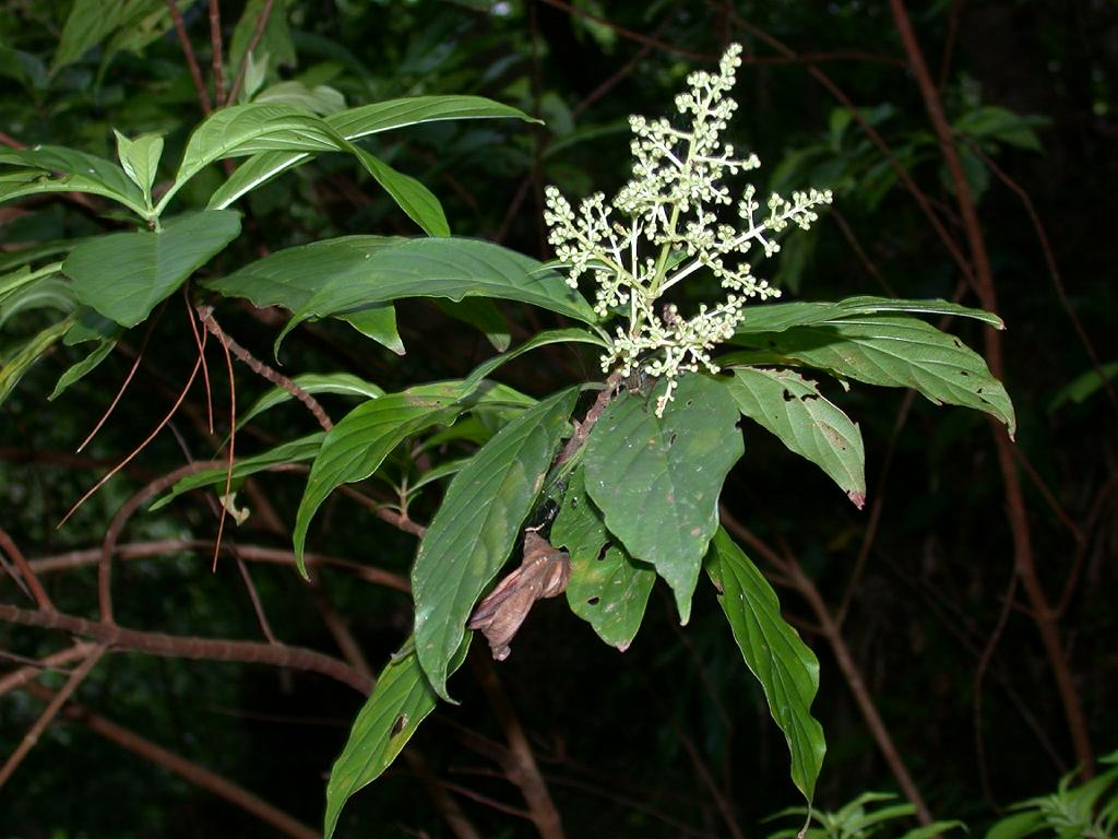 Wendlandia formosana：アカミズキ 2006/8/11 沖縄本島：Okinawa Island, Japan